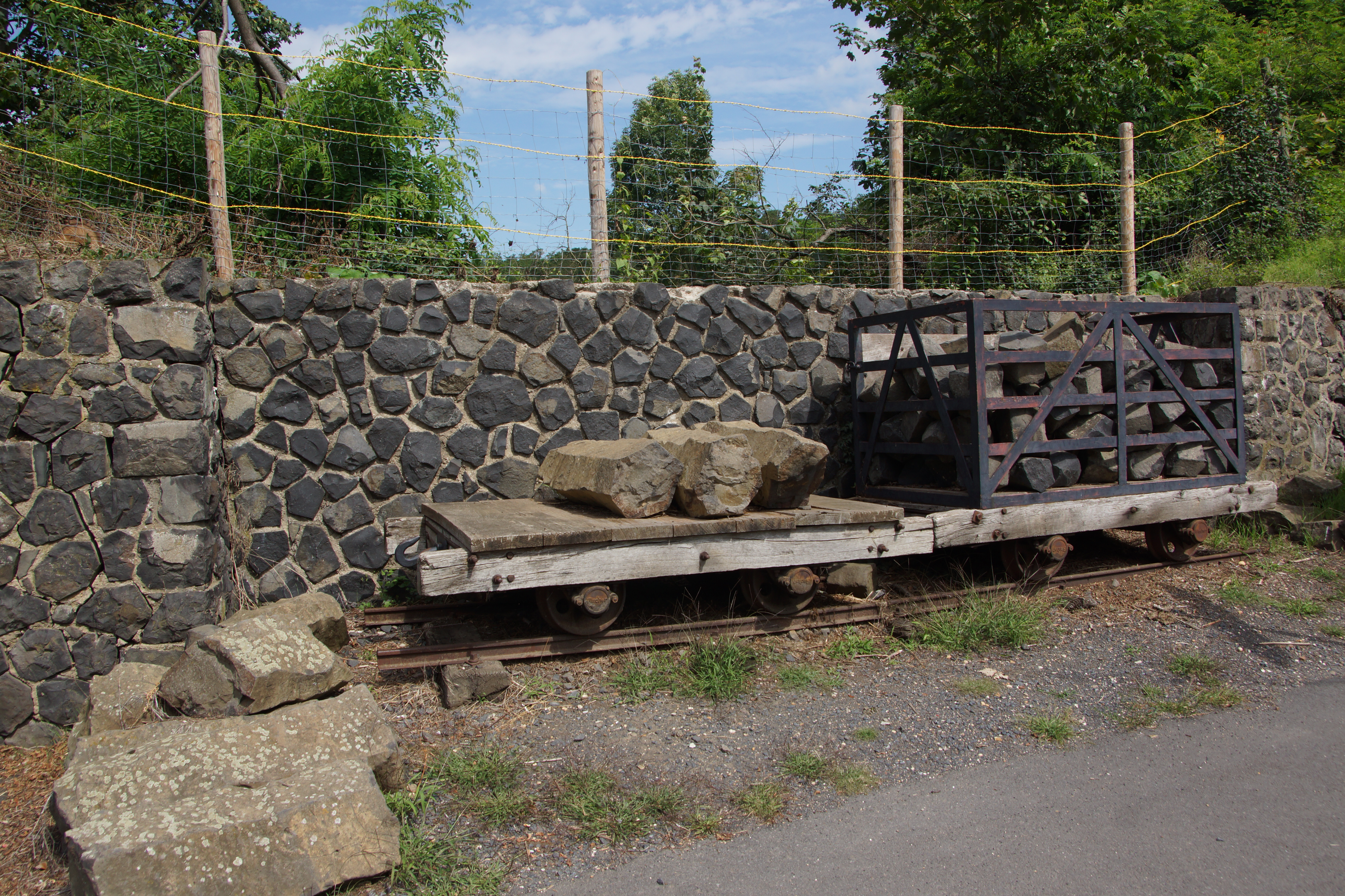 Rest der Bergbahn (1888–1962) in Dattenberg